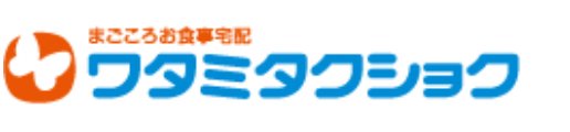 「ワタミの宅食」ブランド成立前の旧・ワタミタクショク株式会社のロゴ。